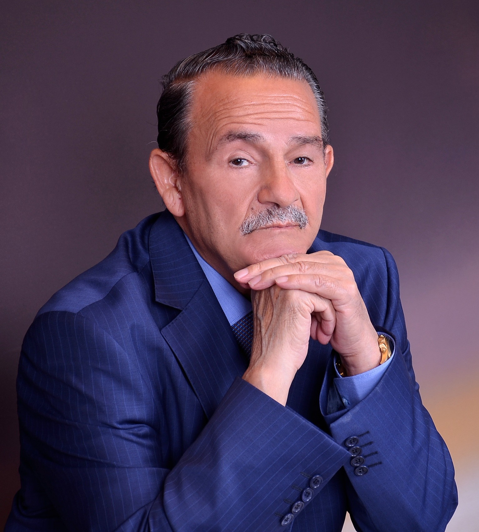 Əjdər İsmayılov (tam adı:İsmayılov Əjdər Tağı oğlu; d. 23 aprel, 1938. Çomaxtur, Şərur rayonu, Naxçıvan MSSR, Azərbaycan SSR) — filologiya elmləri doktoru, professor, 91-lərdən, YAP-ın ən fəal yaradıcılarından biri.